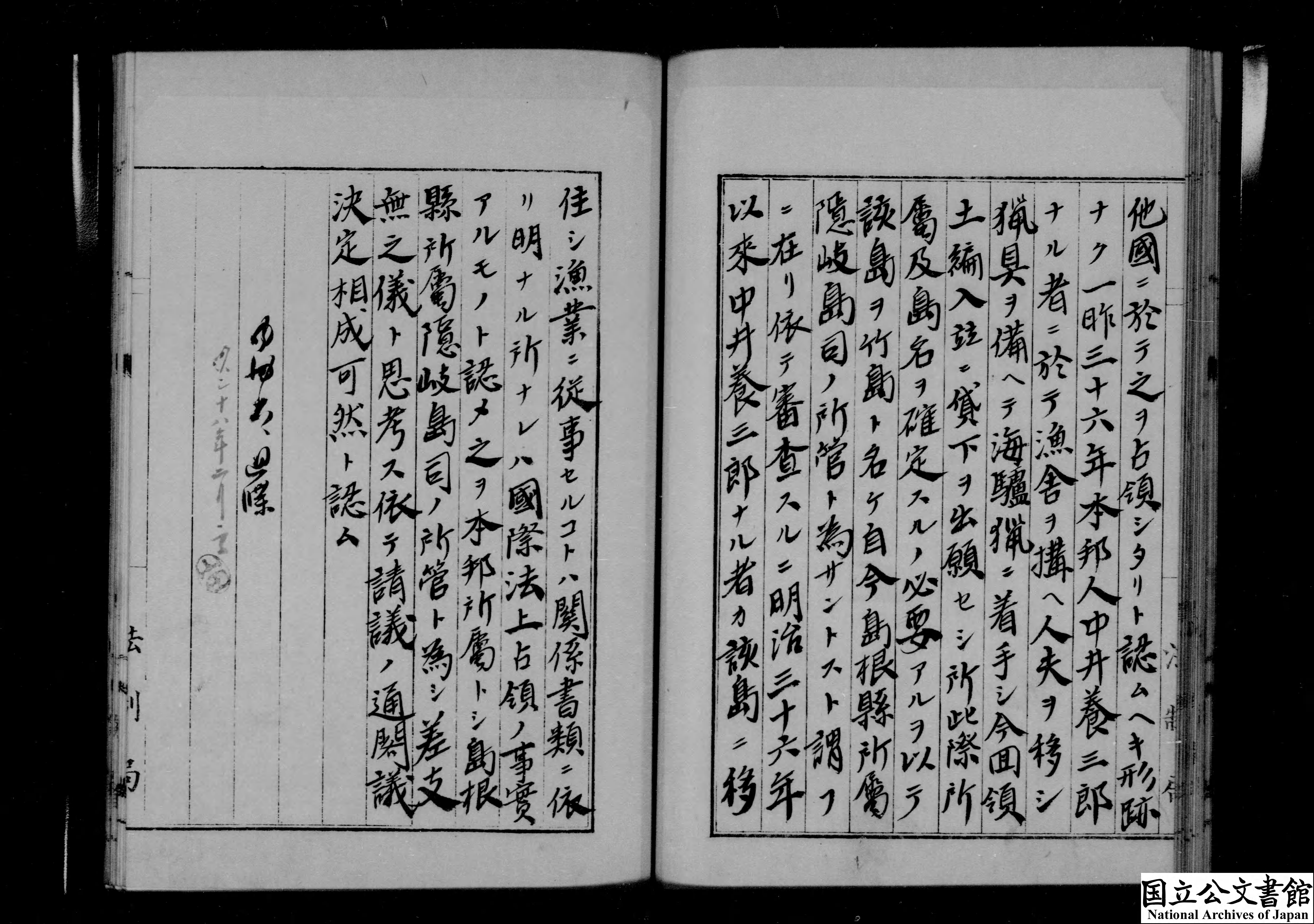 件名 隠岐島ヲ距ル西北八十五哩ニ在ル無人島ヲ竹島ト名ヶ島根県所属隠岐島司ノ所管ト為ス 階層 公文書＞＊内閣・総理府＞太政官・内閣関係＞第六類 公文類聚＞公文類聚・第２９編・明治３８年＞簿冊 : 数件の件名または細目を１冊に綴じたものです。公文類聚・第二十九編・明治三十八年・第一巻・政綱・帝国議会・行政区・地方自治・雑… 請求番号 本館-2A- 011-00・類00981100 件名番号 014 作成部局 内閣 年月日 明治38年02 月02日 資料内容 無人島所属に関する件 北緯３７度９分３０秒東経１３１度５５分隠岐島を距る西北８５浬に在る無人島は他国に於て之を占領したりと認むへき形跡なく一昨３６年本邦人中井養三郎なる者に於て漁舎を搆へ人夫を移し猟具を備へて海驢猟に着手し今回領土編入並に貸下を出願せし所此際所属及島名を確定するの必要あるを以て該島を竹島と名け自今島根県所属隠岐島司の所管と為さんとす 関連事項 請議 マイクロフィルム リール番号：017300、開始コマ：1375 画像データ グレー画像